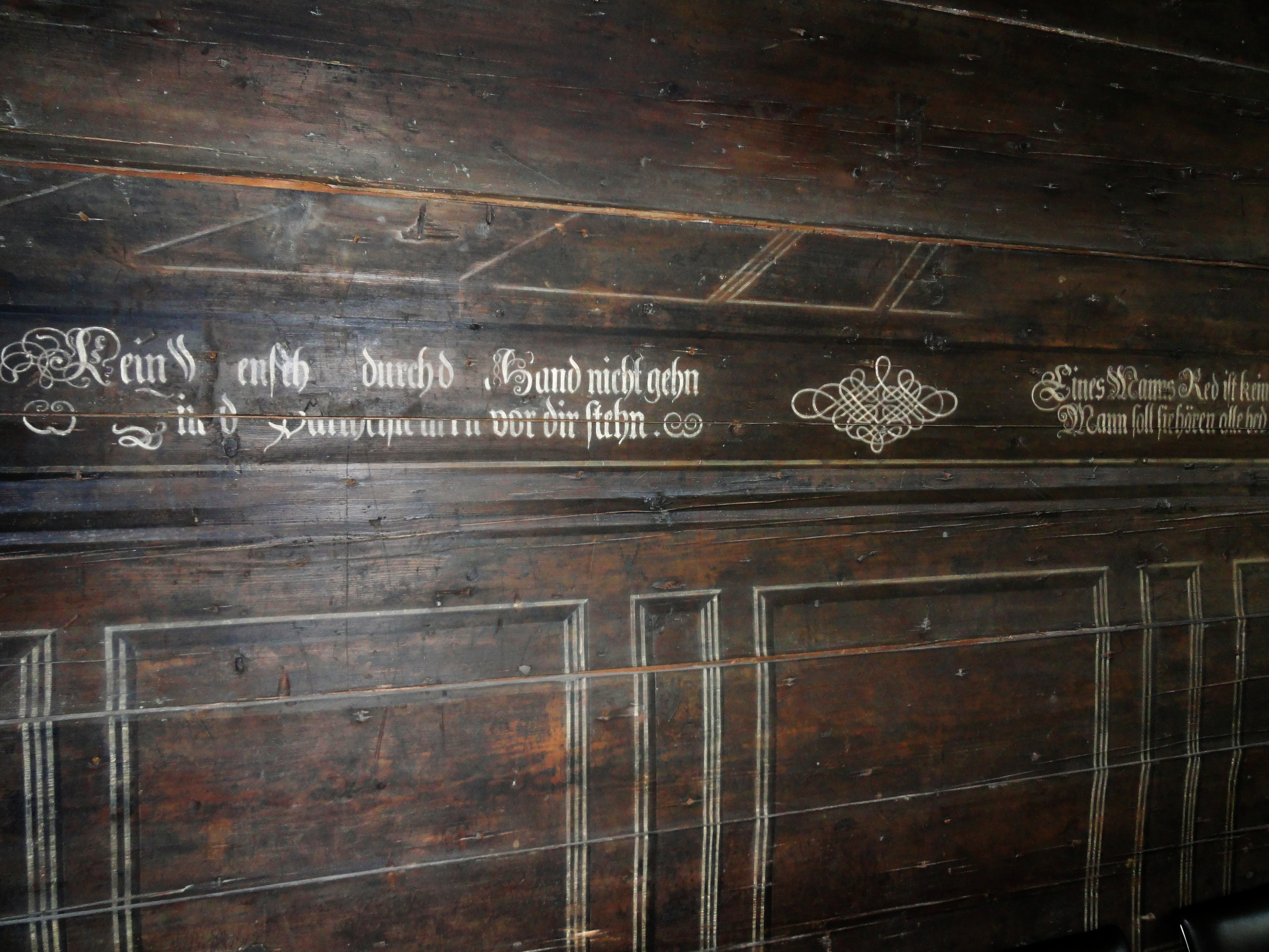 Kleiner Saal im Rathaus Kempten